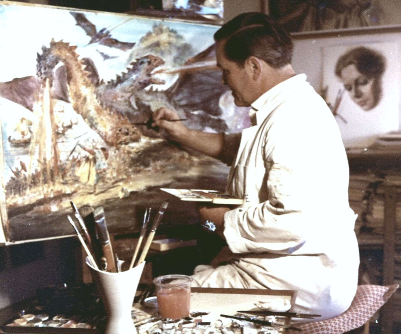 Der Zeichner Helmuth Ellgaard an seiner Staffelei in Hamburg